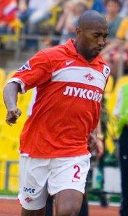 Antônio Géder Malta Camilo